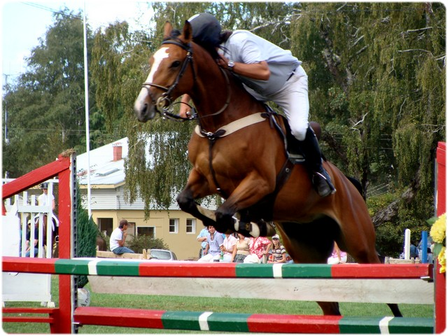 Parque Saval, Región de Los Rios, Chile.